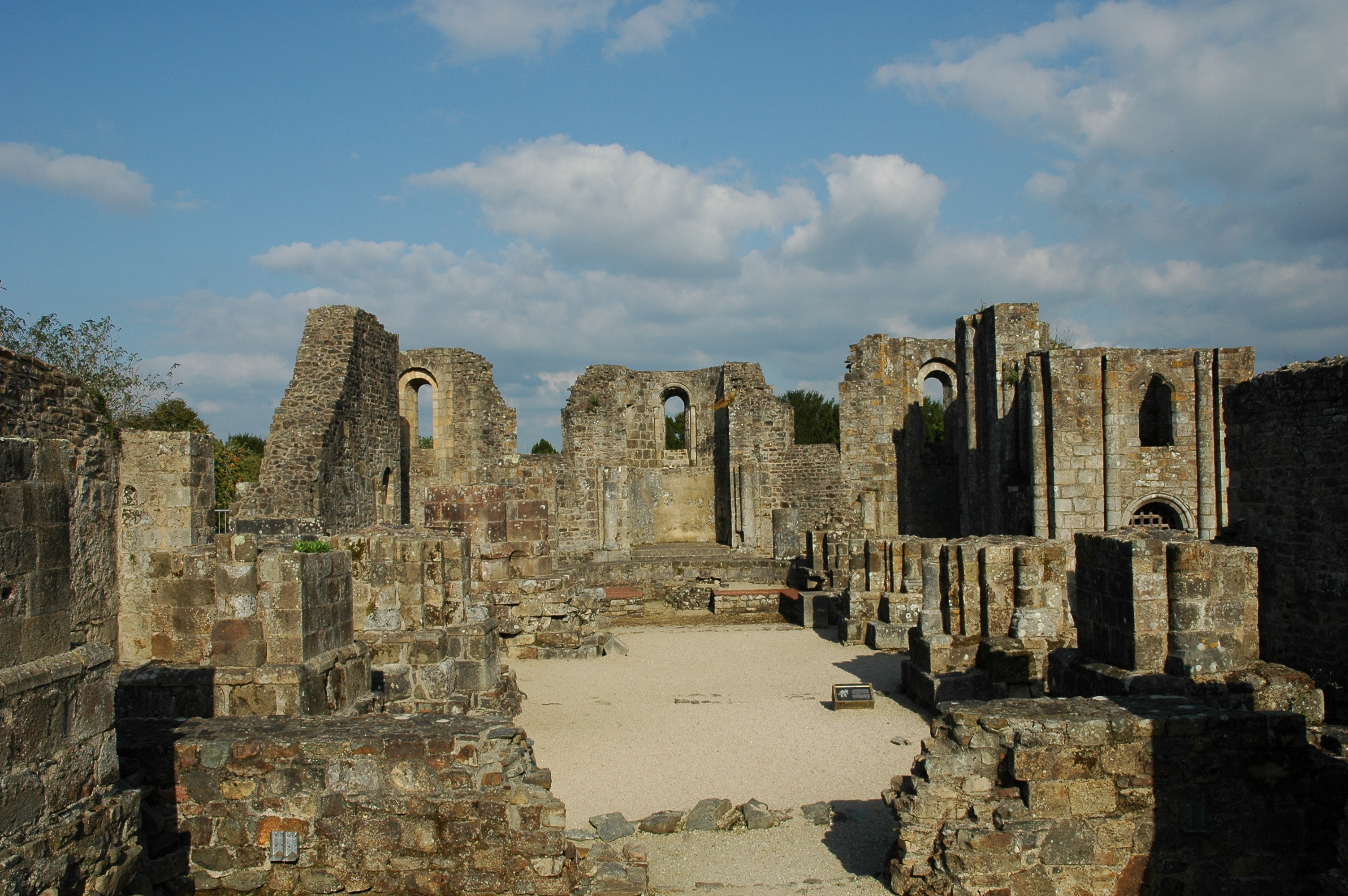 Ruines de l'abbaye de Landévennec, Finistère, France